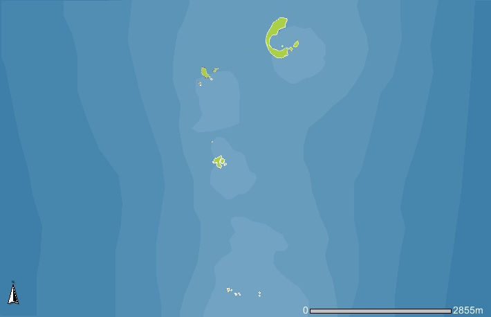 Mapa del parque natural de las Islas Columbretes